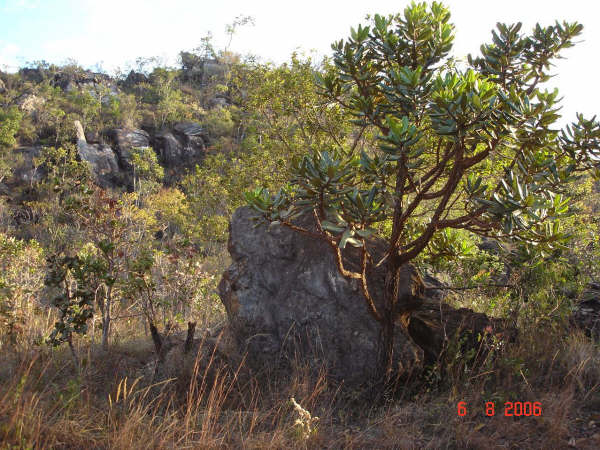 Uma imagem do Cerrado de Catalão